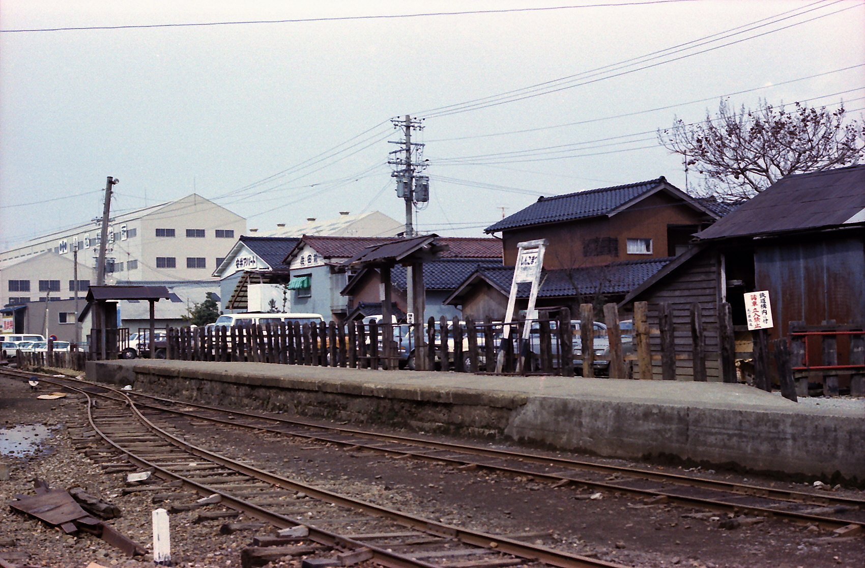 尾小屋鉄道 新小松駅 乗り場